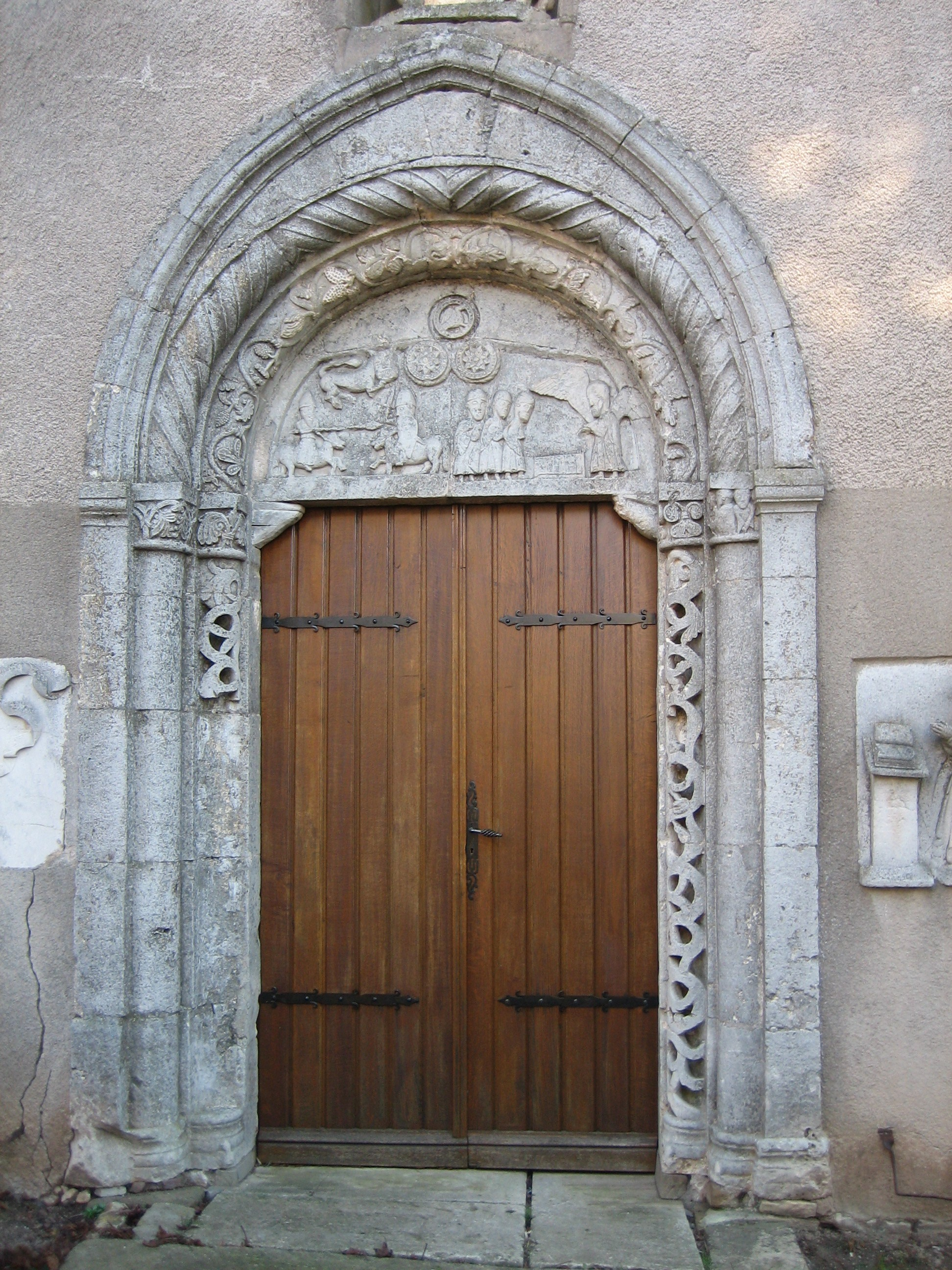 Portail sculpté de l'église de Vomécourt-sur-Madon (88)